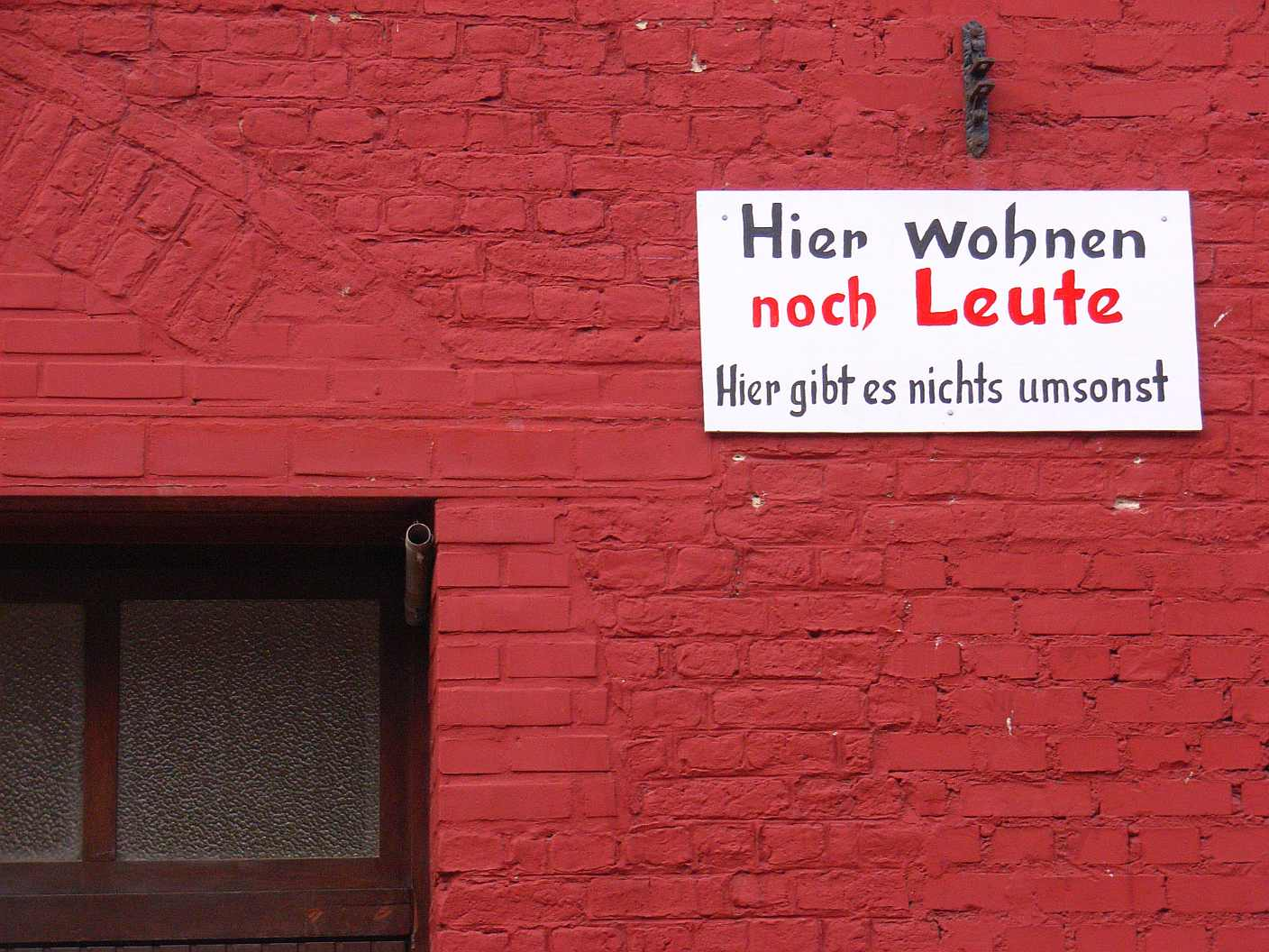 Erkelenz-Pesch, noch bewohntes Haus, Detail, 2009